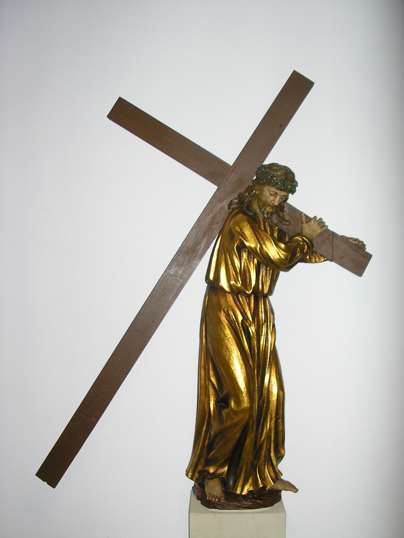 Kreuztragende Jesusfigur in St. Katharina, Voltlage